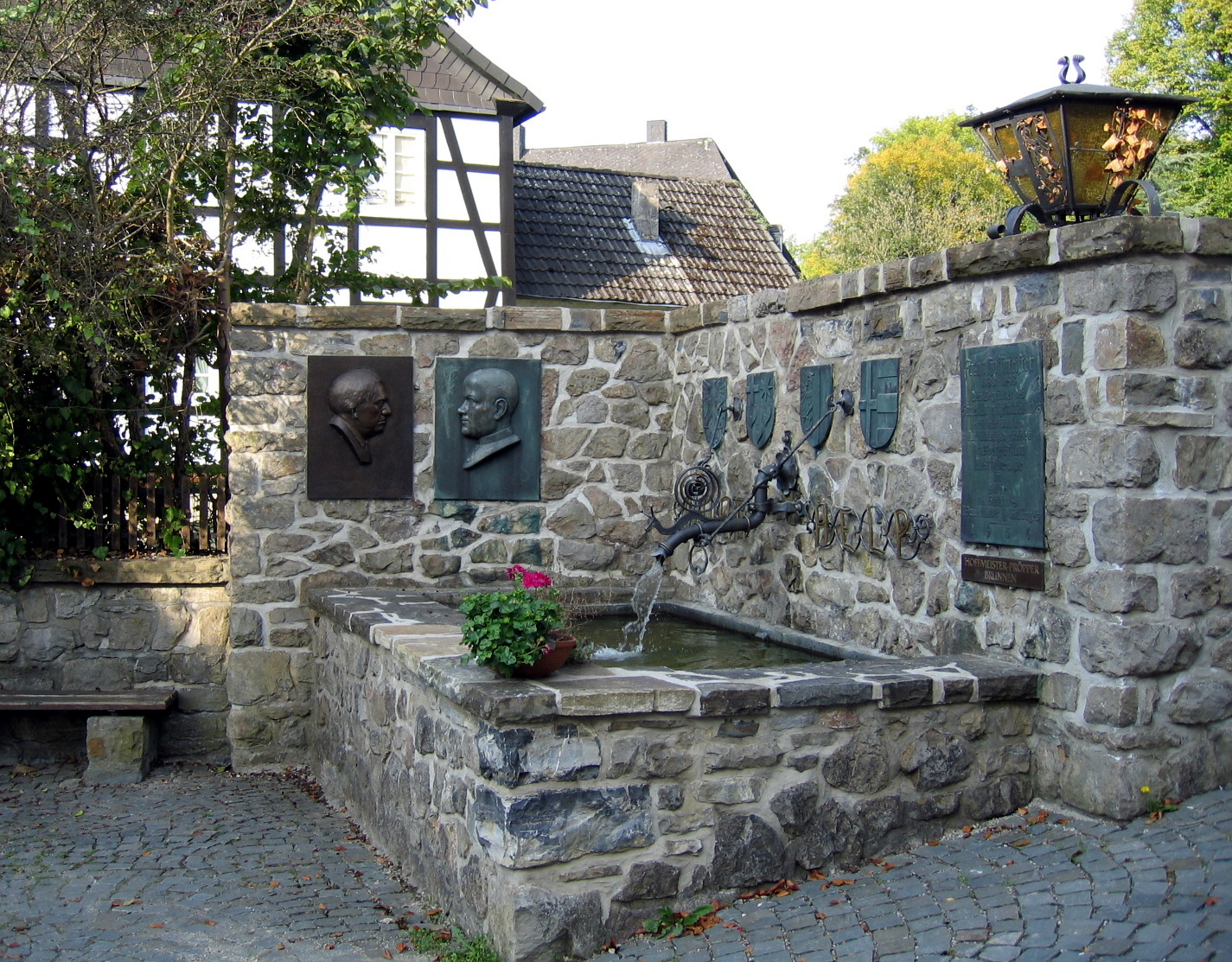 Description: Hoffmeister-Pröpper-Brunnen in Balve, 1956 dem Begründer des Sauerländer Heimatbundes, Franz Hoffmeister (1898 bis 1943), errichtet von den kurkölnischen Kreisen Arnsberg-Brilon-Meschede-Olpe Source: selbst fotografiert Date: 9. Okt. 2005 Author: Bubo